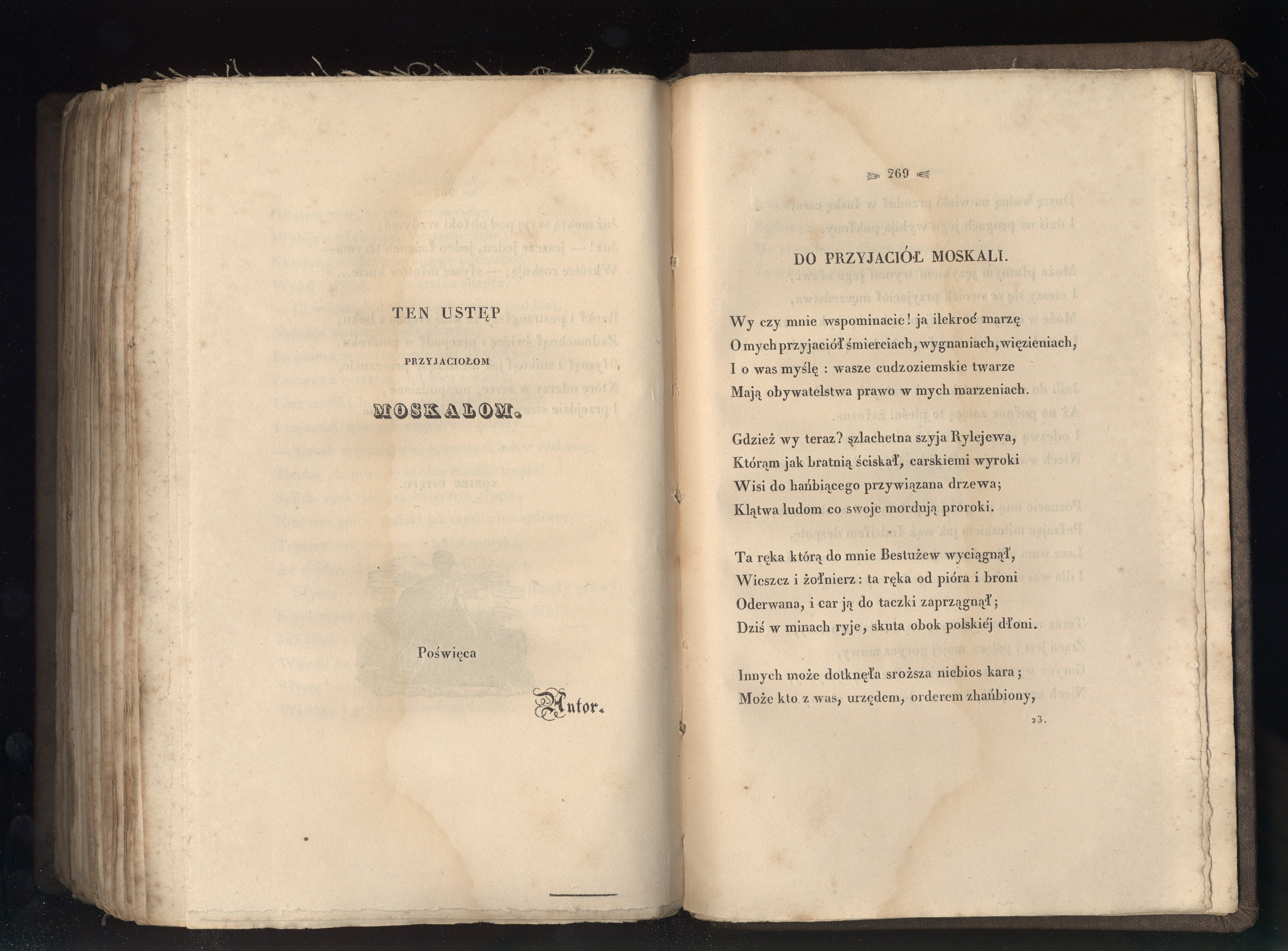 Fragment, z III części Dziadów, z Ustępu